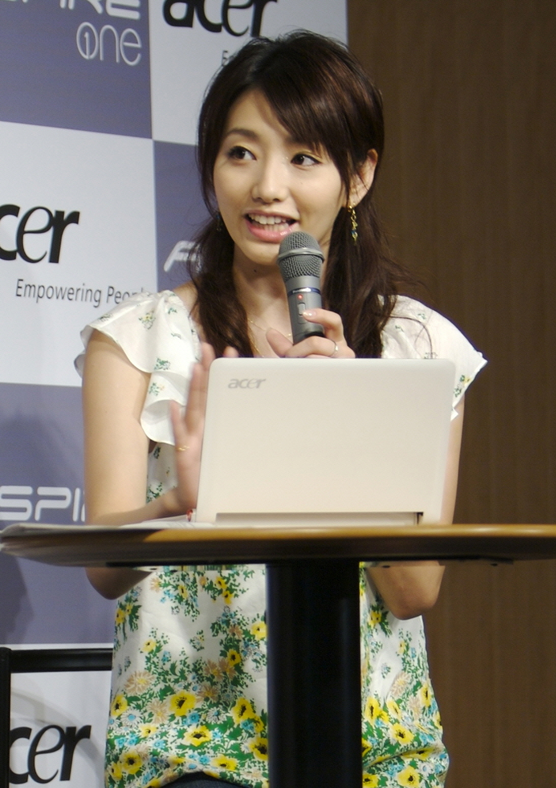 眞鍋かをり